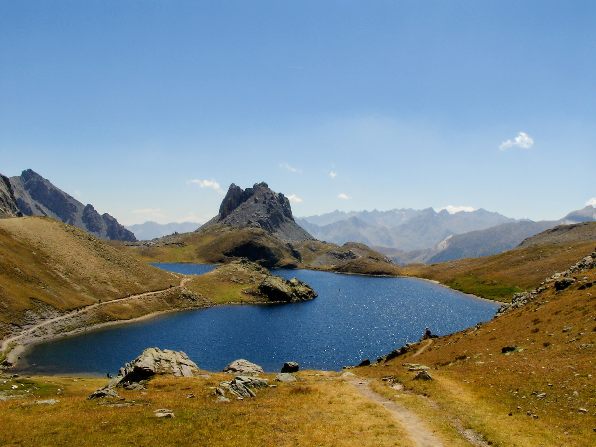 Alte Valli Stura e Maira (Q47364759)